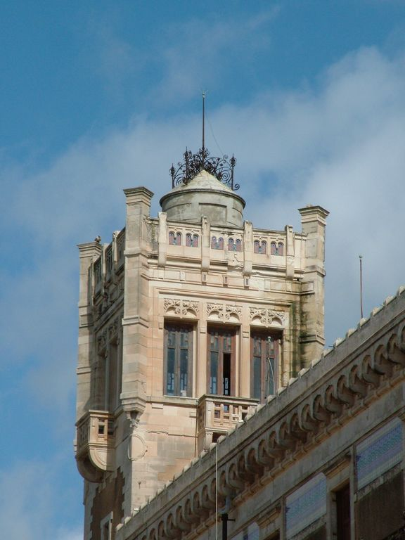 Particolare della Torre di Palazzo Bruno di Belmonte - Sede Comunale